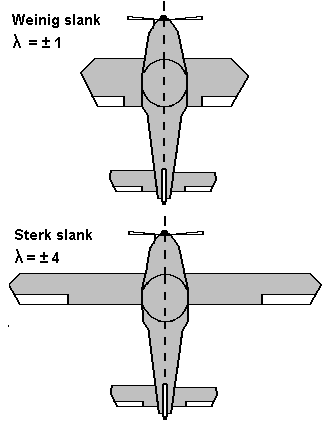 Verschik in slankheid van een vleugel